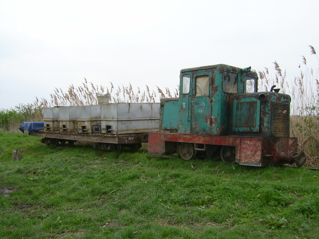 Működőképes (!) C-50-es mozdony halszállító tartályokkal a Csanyteleki (Tömörkényi) Halgazdasági Vasúton, 2006. április 13-án.